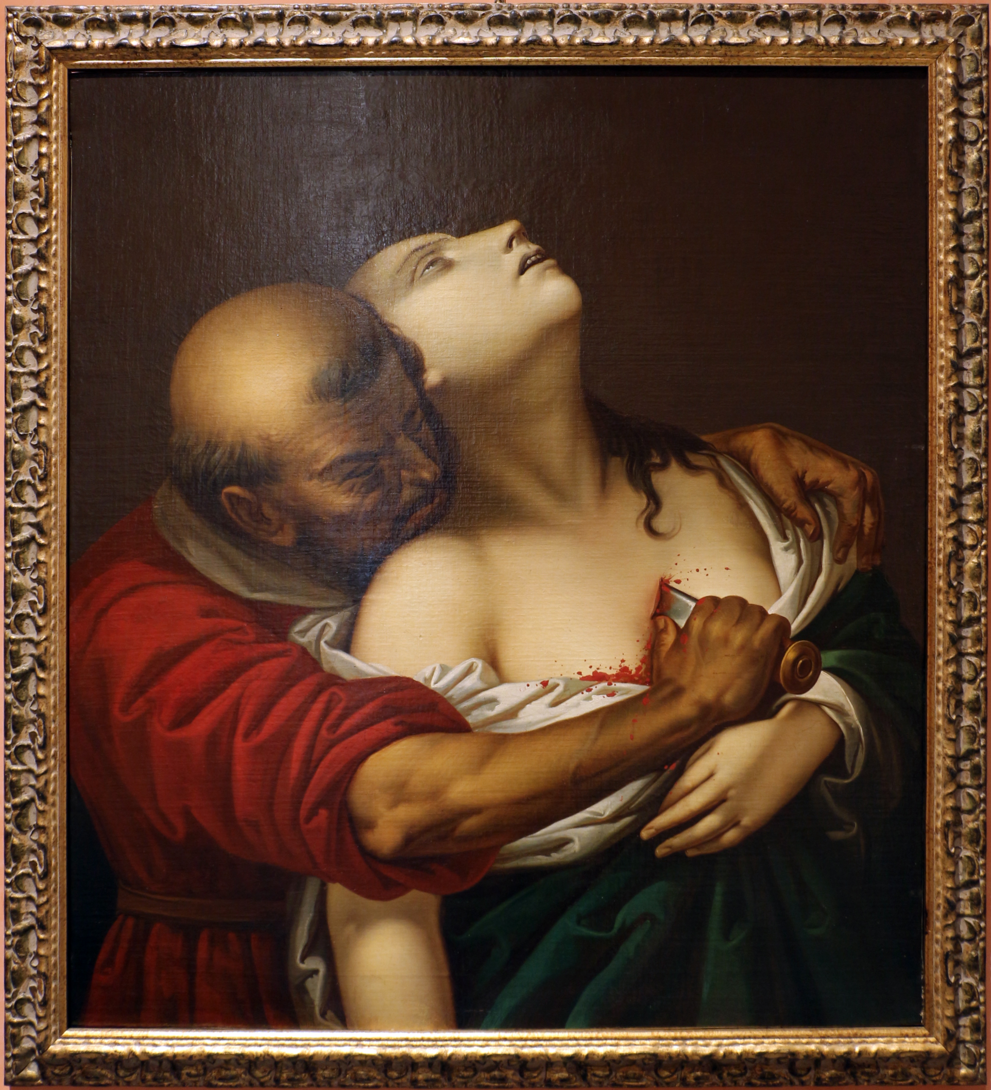 Pinacoteca civica di Reggio Calabria - paintings This is a photo of a monument which is part of cultural heritage of Italy.